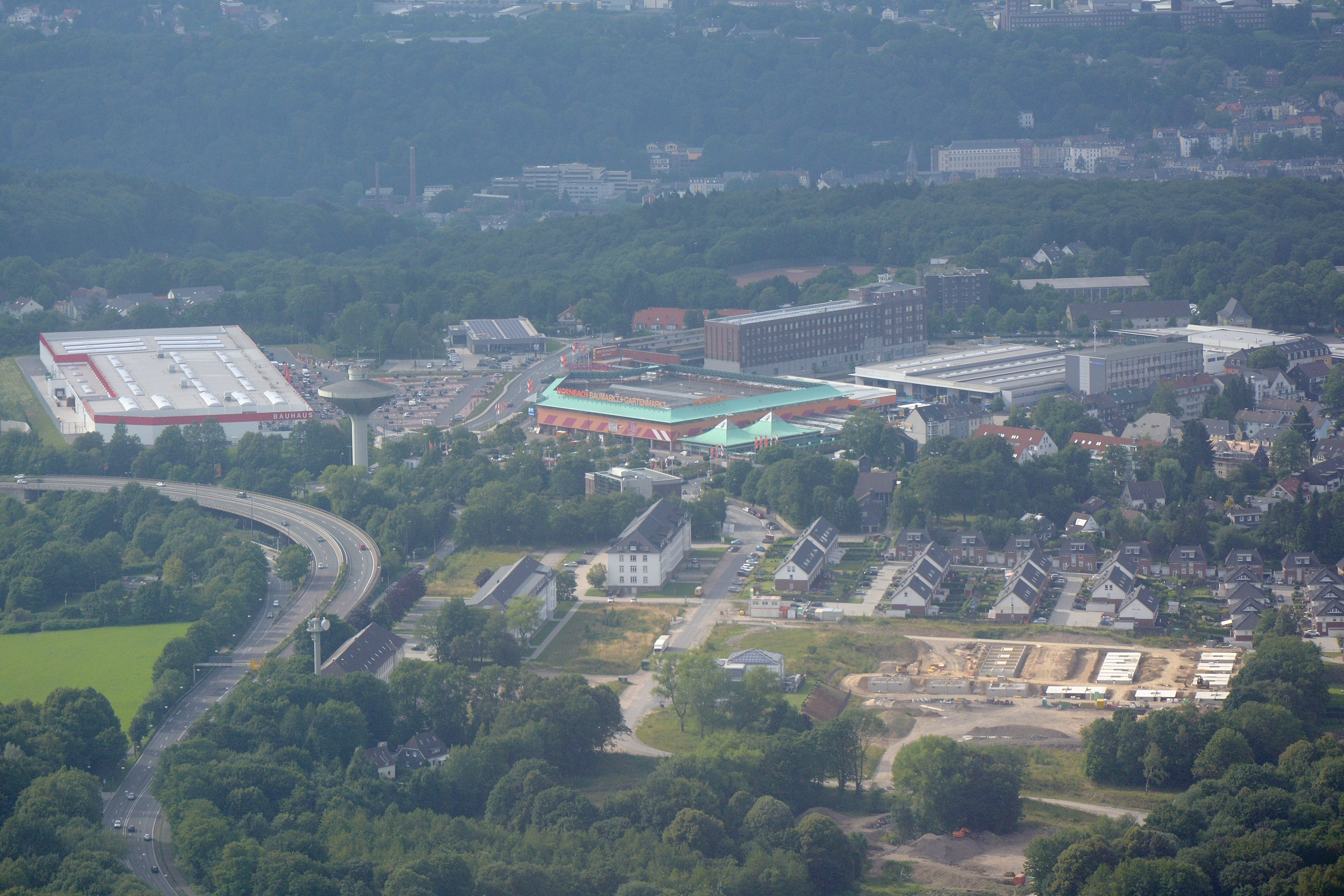 Wuppertal-Lichtscheid und Lichtenplatz mit Wasserturm, ehemaliger Colmar-Kaserne, Baumärkten und Werksgebäude von Vorwerk Autotec, Landesstraße 419 mit Überflieger